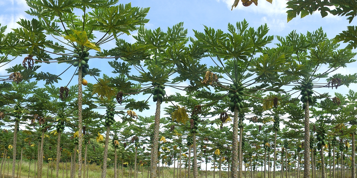 Остров Гвайи. Иллюстрация Второва И.П. для учебника Гавайеведение.